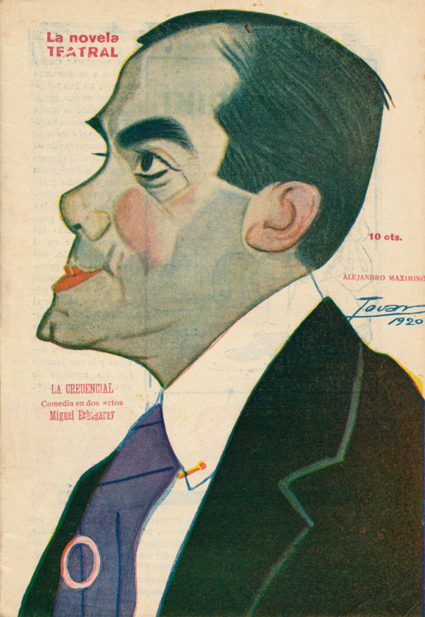 Caricatura de Alejandro Maximino.